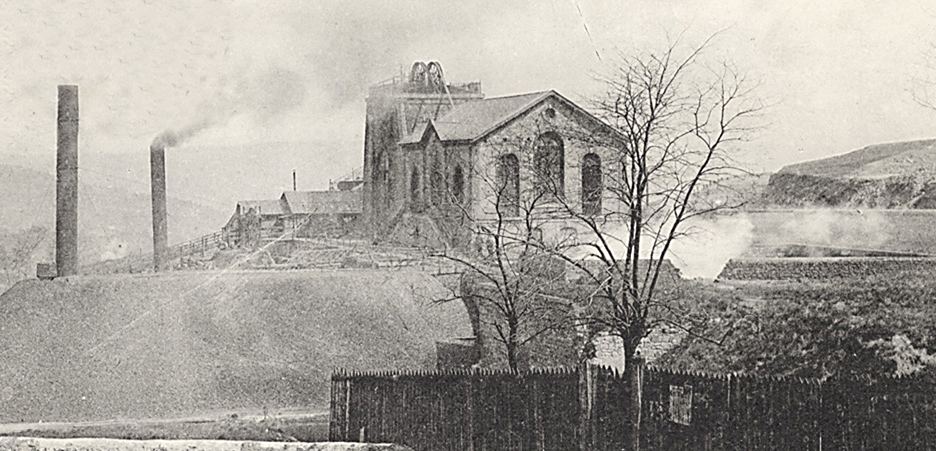 Puits Montmartre en maconnerie, St.-Etienne, 42, Fr